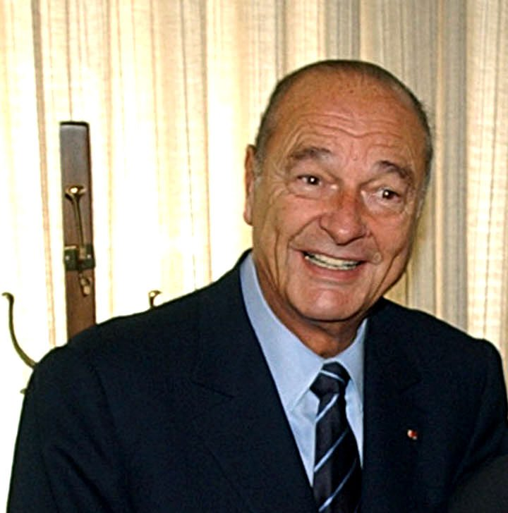 O presidente da França Jacques Chirac.